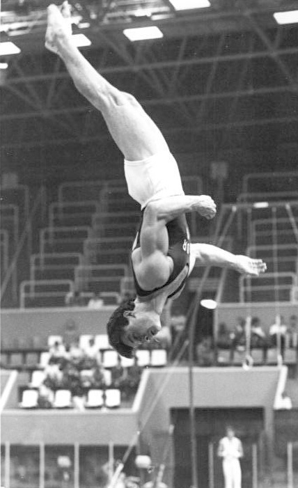 Ulf Hoffmann ADN-ZB Thieme 8.9.85-St.-Brandenburg: DDR-Turnmeisterschaften -Titelträger beim Bodenturnen der Männer wurde Ulf Hoffmann (SC Dynamo Berlin) mit 19.350 Punkten, vor Sylvio Kroll SC Cottbus) mit 19.150 Punlkten. (Foto von einem früheren Wettkampf)